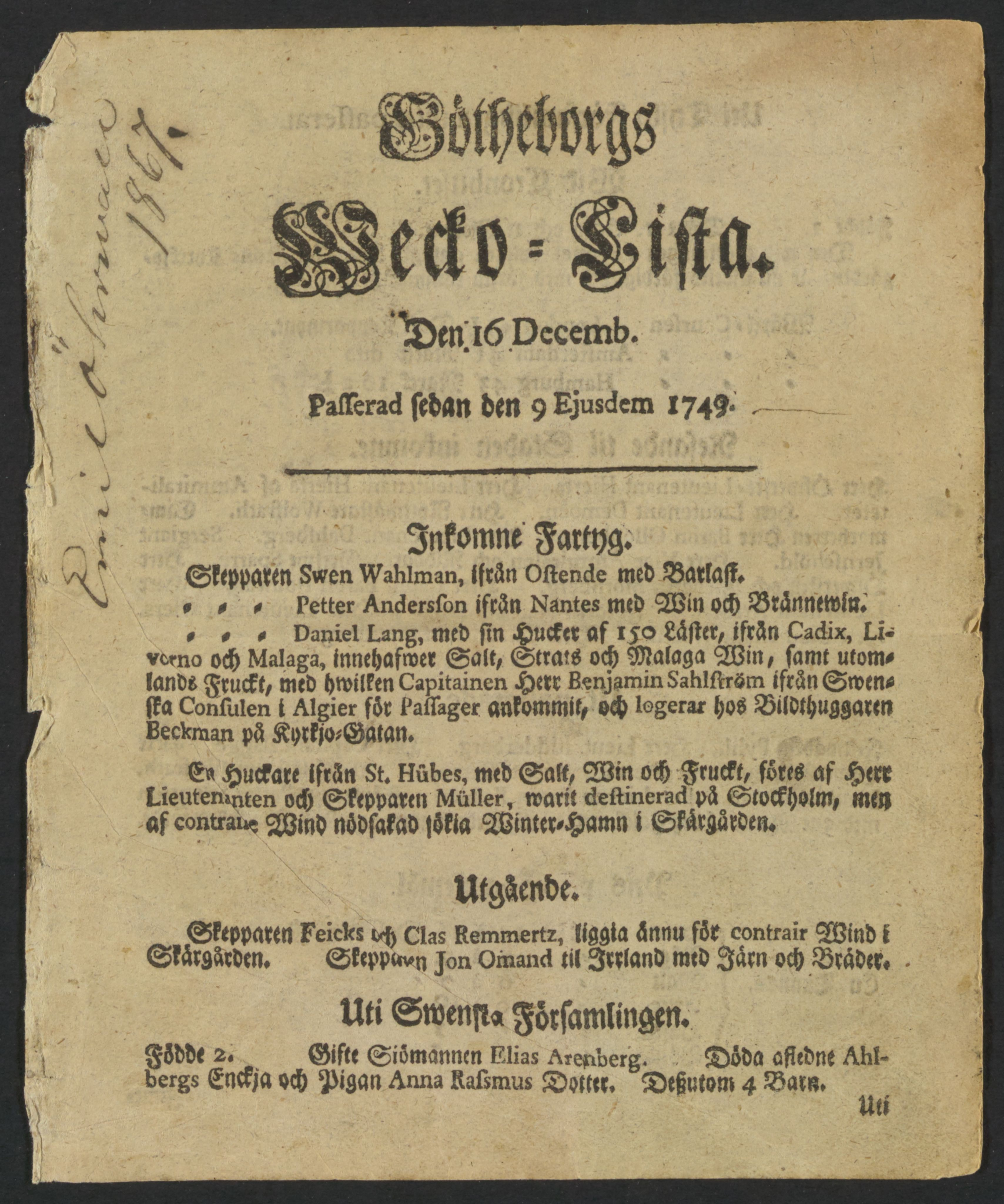 Första(?) numret av Götheborgs Wecko-Lista.